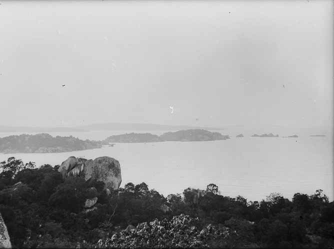 Victoriasee Contents 1 Summary 2 Summary 3 Licensing 4 Original upload log Summary Text auf der Hülle:A b III 62 / 583 / Inseln vor Muansa / J. & Oe 583 Entstehungsjahr Vorlage:1906/1907 Photograph:Jaeger und Oehler Region:DOA - Tansania - Mwanza - Victoriasee Summary Der Bildbestand der Deutschen Kolonialgesellschaft in der Stadt- und Universitätsbibliothek Frankfurt am Main [1] Einige der vom Kolonialen Bildarchiv in Frankfurt a. Main [2] veröffentlichten Bilder wurden von Mitarbeitern des Bildarchivs nachbearbeitet oder dort erstveröffentlicht. Eine Weiterverwendung ist unter der Auflage einer deutlichen Quellenangabe gestattet.